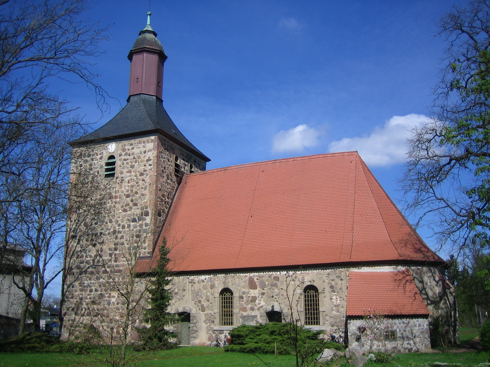 Dorfkirche Nikolai in Bötzow (Brandenburg)